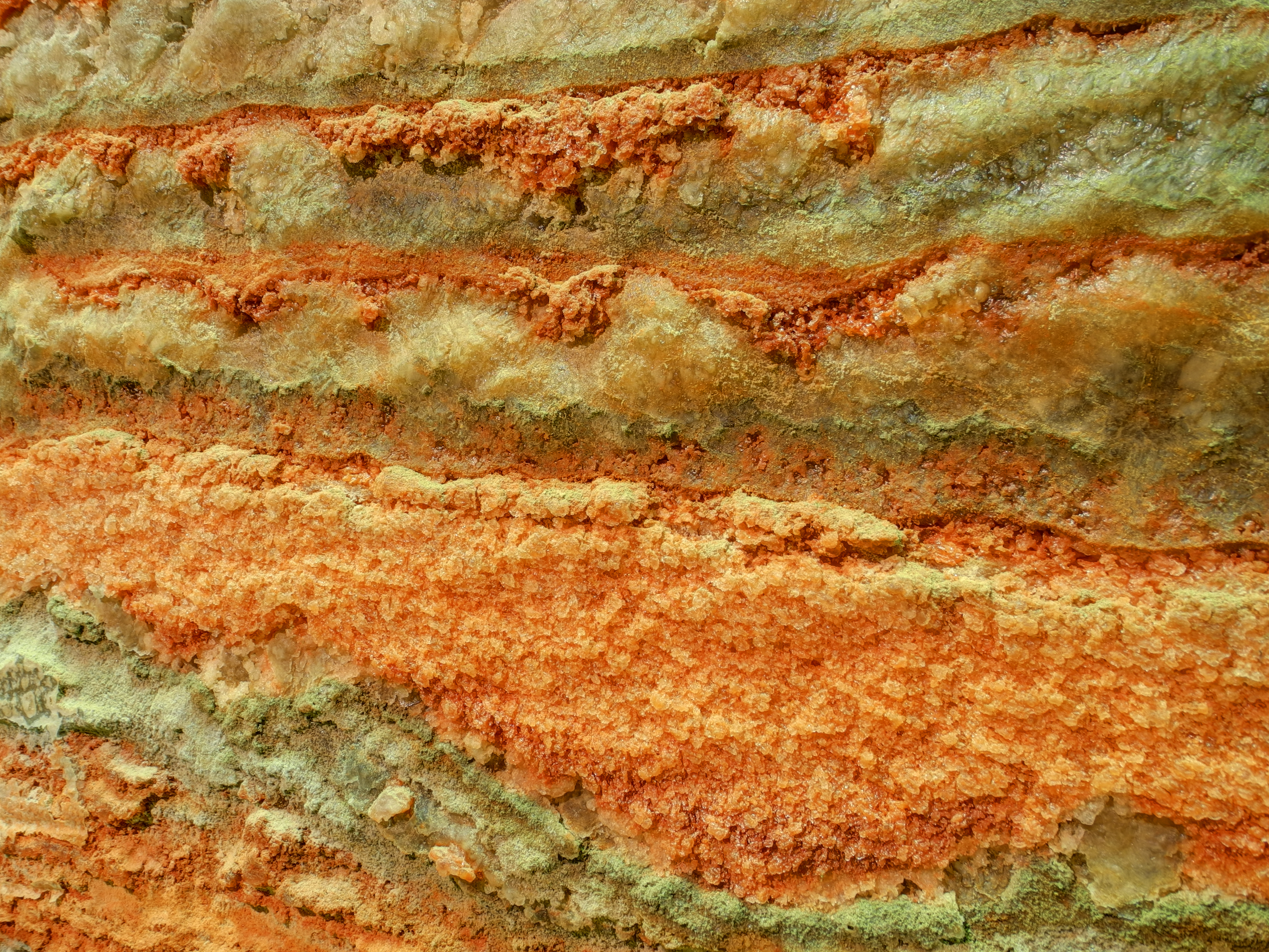 Puits Rodolphe : échantillon de potasse (HDR).